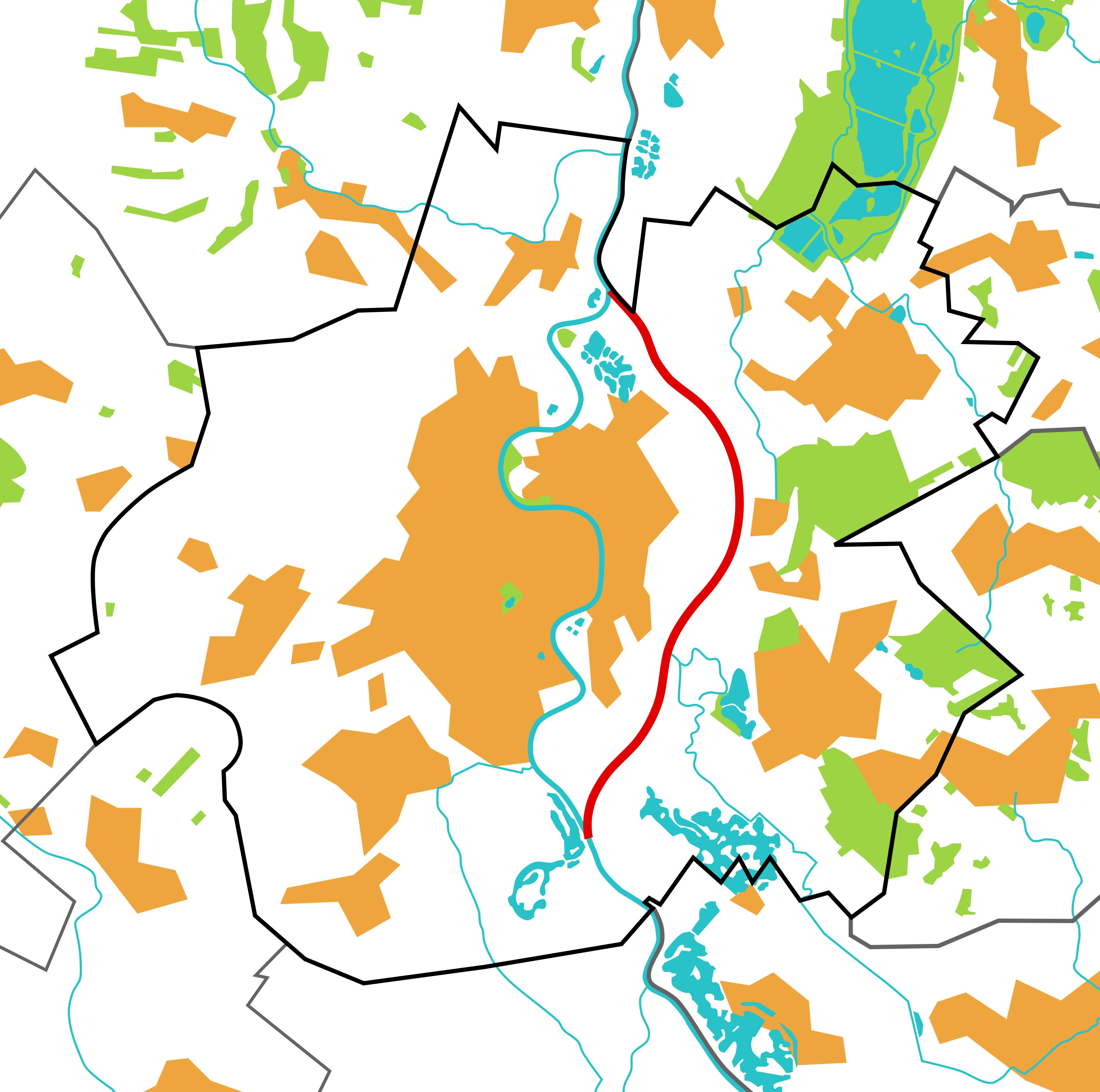 Mapa Raciborza z zaznaczonym na czerwono kanałem Ulga.